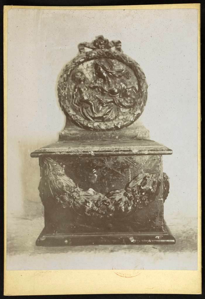 Fronsac église St Martin Tronc